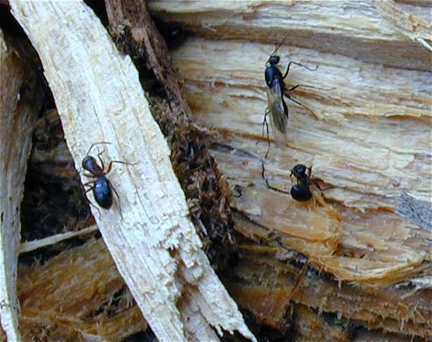 Schwarze Rossameise (Camponotus herculeanus), Arbeiterin und überwinterndes Männchen, Aufnahme Januar 2007, Südniedersachsen